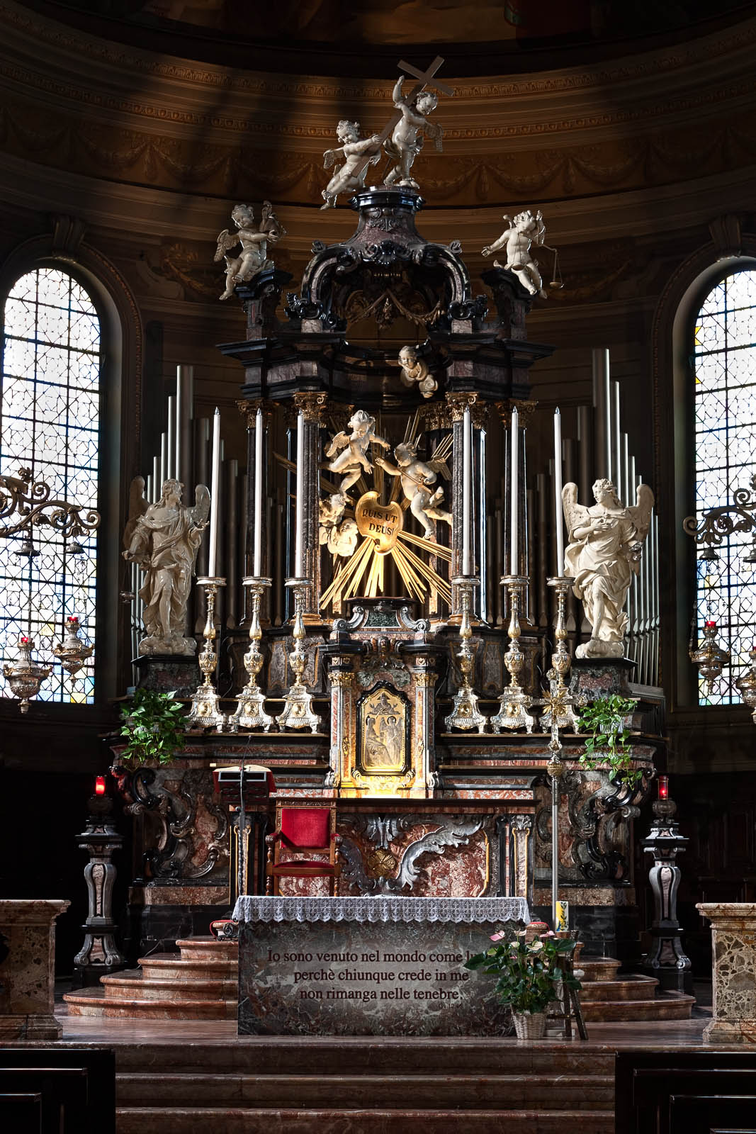 San Michele Arcangelo This is a photo of a monument which is part of cultural heritage of Italy.